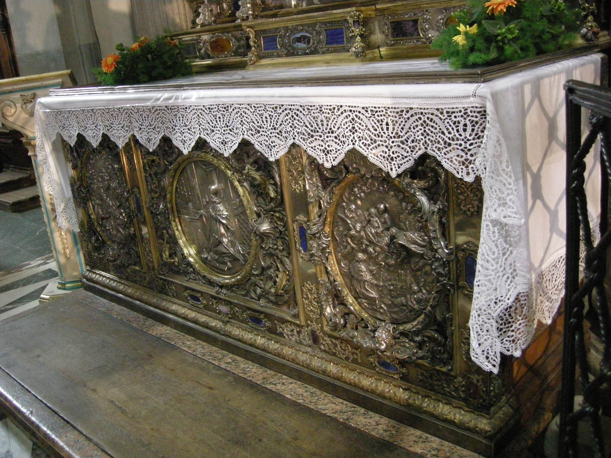 Santuario di Santa Maria dell'Impruneta, interno, tempietto della vergine, altare della vergine by cosimo merlini e bernardo holzmann